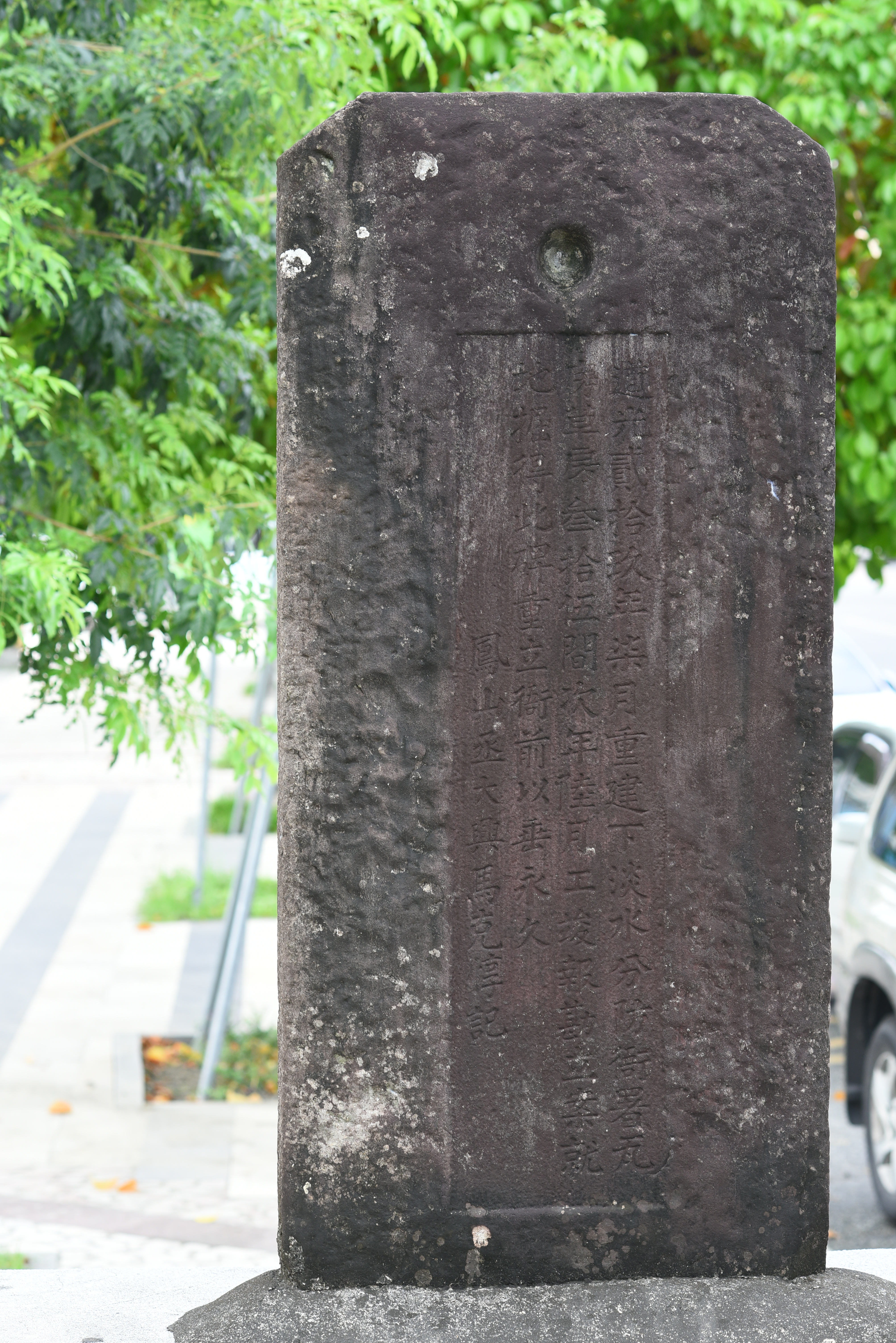 2018 屏東縣里港鄉呂岳德政碑發現記 道光三十年(1850年)六月 道光貳拾玖年柒月，重建下淡水分防衙署瓦房、草房參拾伍間；次年陸月工竣，報勘立案。就地掘得此碑，重立衙前，以垂永久。 鳳山丞大興馬克惇記 Ligang Township, Pingtung County